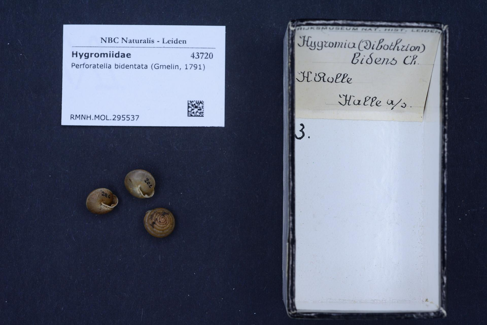 Perforatella bidentata (Gmelin, 1791)